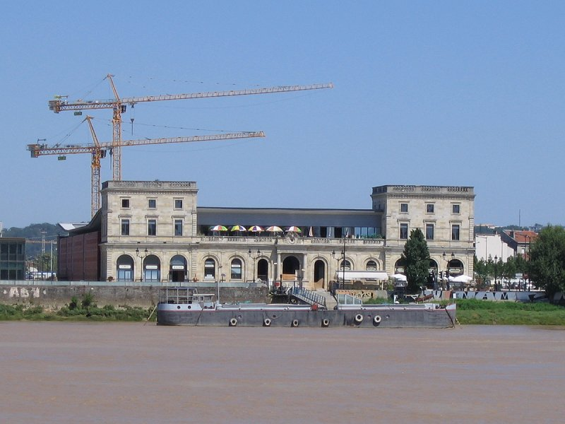 L'ancienne gare de Bordeaux Bastide devenue un complexe de cinéma